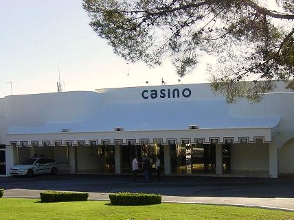 Eingang des Casinos, Schacholympiade 2004 in Calvià